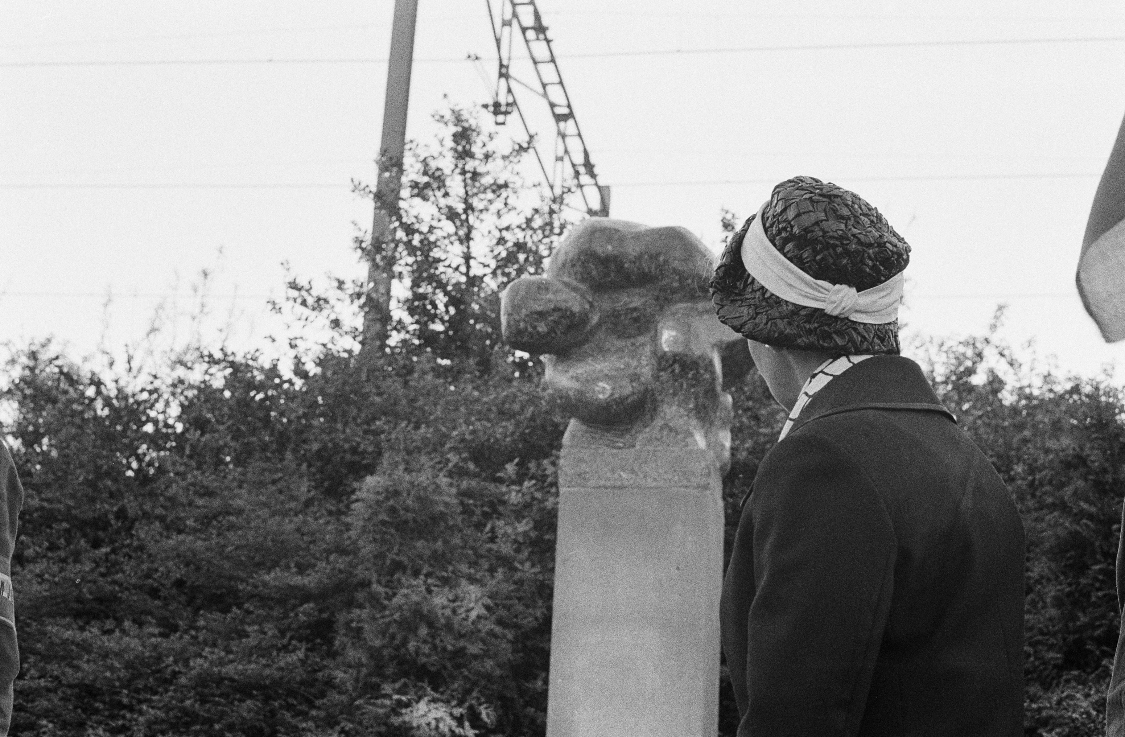 Collectie / Archief : Fotocollectie Anefo Reportage / Serie : [ onbekend ] Beschrijving : Mevrouw E. van Hall-Nijhoff onthult het verzetsmonument Het Buikschot aan de Tugelaweg in Amsterdam Annotatie : De ontwerper is Adam Jansma Datum : 6 juni 1962 Locatie : Amsterdam, Noord-Holland Trefwoorden : onthullingen, oorlogsmonumenten Persoonsnaam : Hall-Nijhoff, E. van Fotograaf : Gelderen, Hugo van / Anefo, [onbekend] Auteursrechthebbende : Nationaal Archief Materiaalsoort : Negatief (zwart/wit) Nummer archiefinventaris : bekijk toegang 2.24.01.05 Bestanddeelnummer : 913-9991